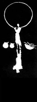 Logo Internasjonalt Seminar i Tromsø